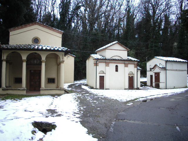 San Vivaldo, Motaione: Cappelle dalla Madonna dello spasimo, della Casa di Pilato e dell'Andata al Calvario